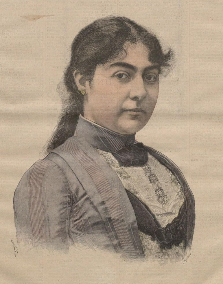 La reine Nathalie de Serbie